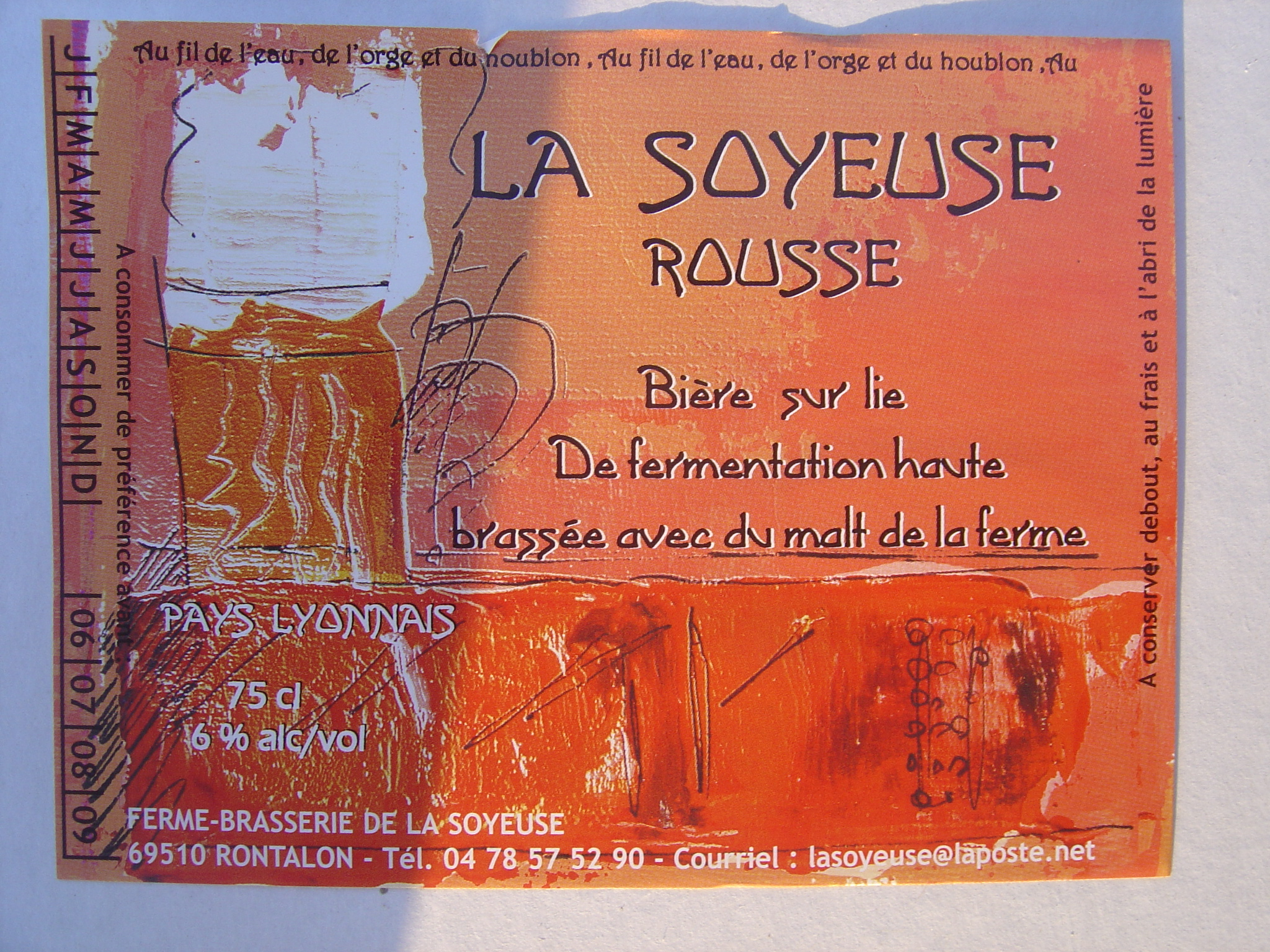 Etiquette Bière "La Soyeuse" Rousse - Bière artisanale brassée à Rontalon (Rhône)